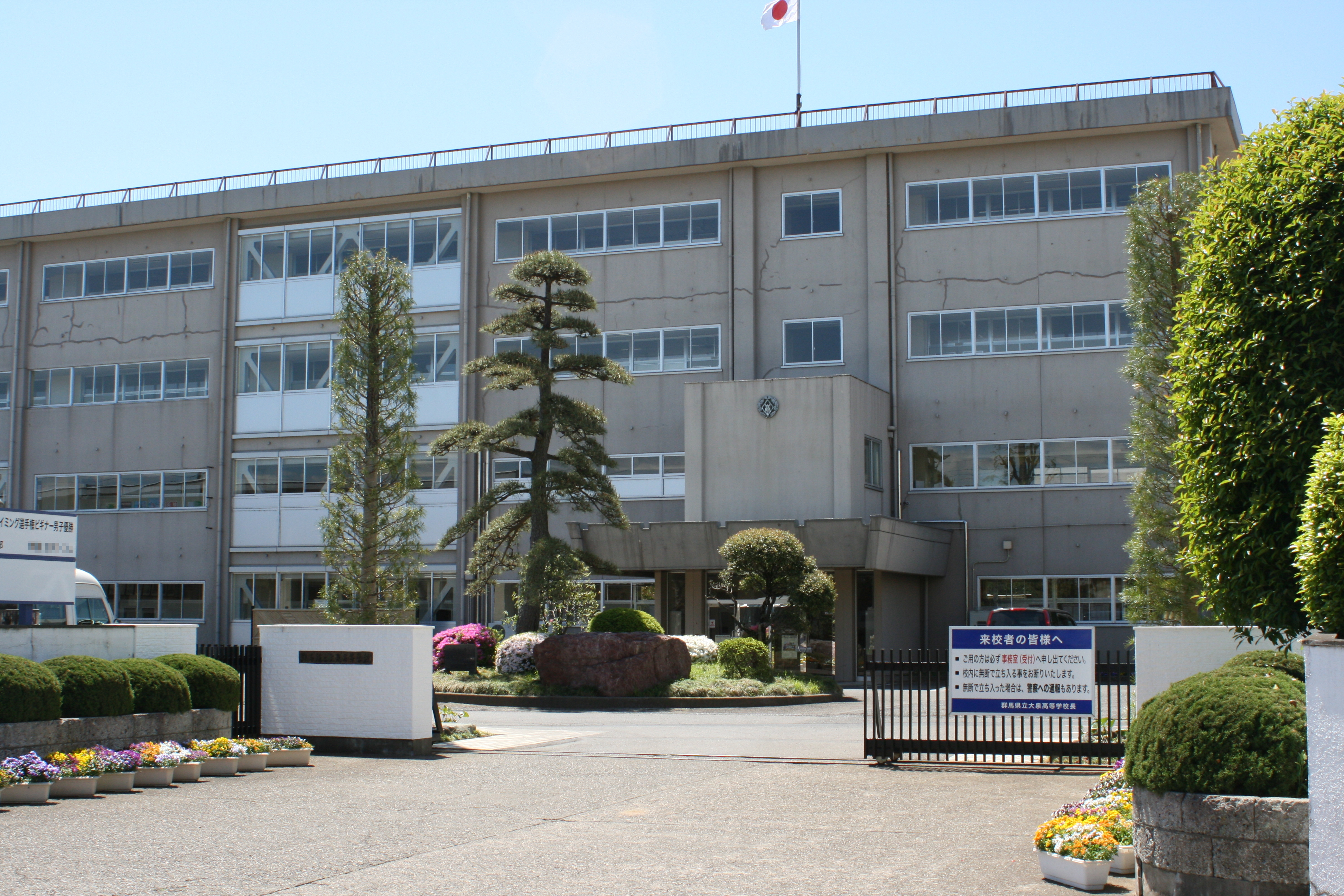 Gunma prefectural Ōizumi high school